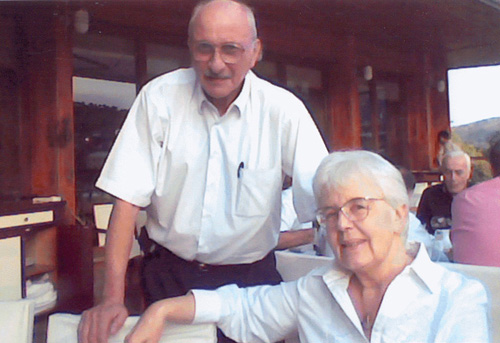 გიორგი შხვაცაბაია